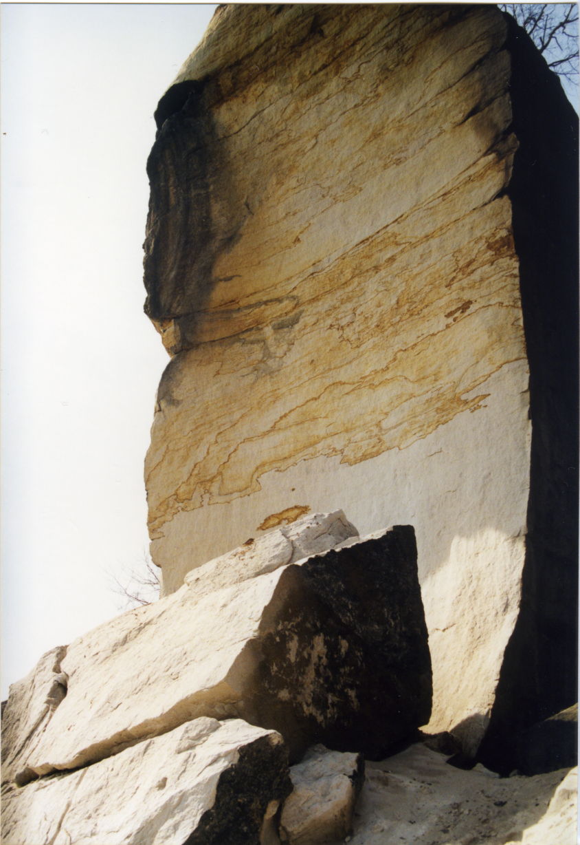 Der Felsen Wartturm im Elbsandsteingebirge